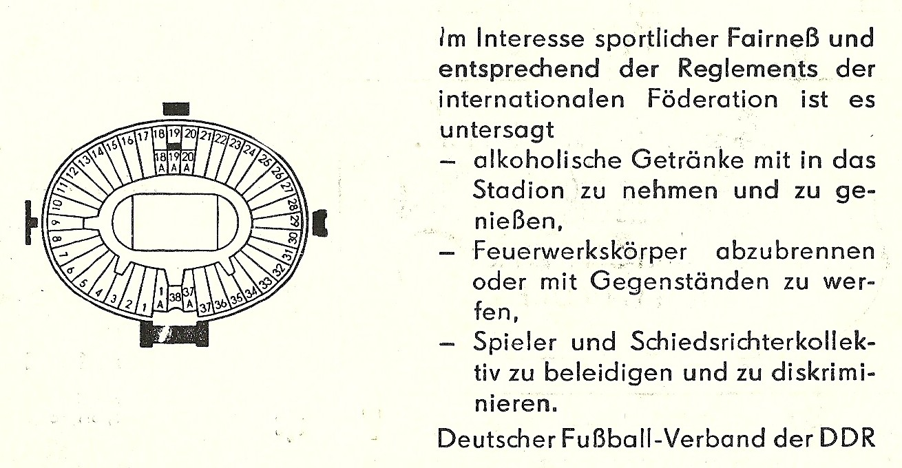 Rückseite der Eintrittskarte DDR-Belgien vom 30.03.1983 - altes Zentralstadion Leipzig